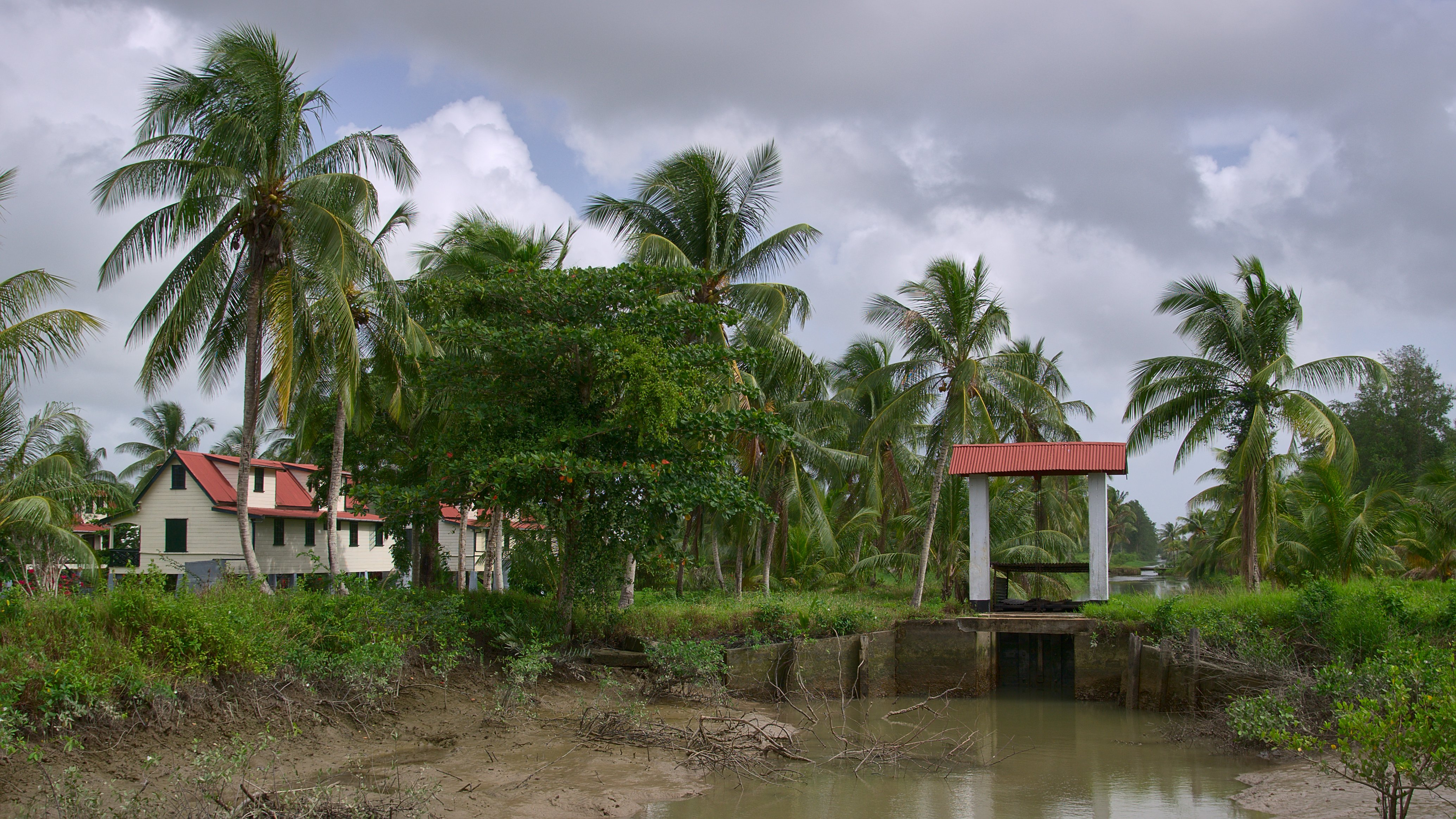 Sluisje